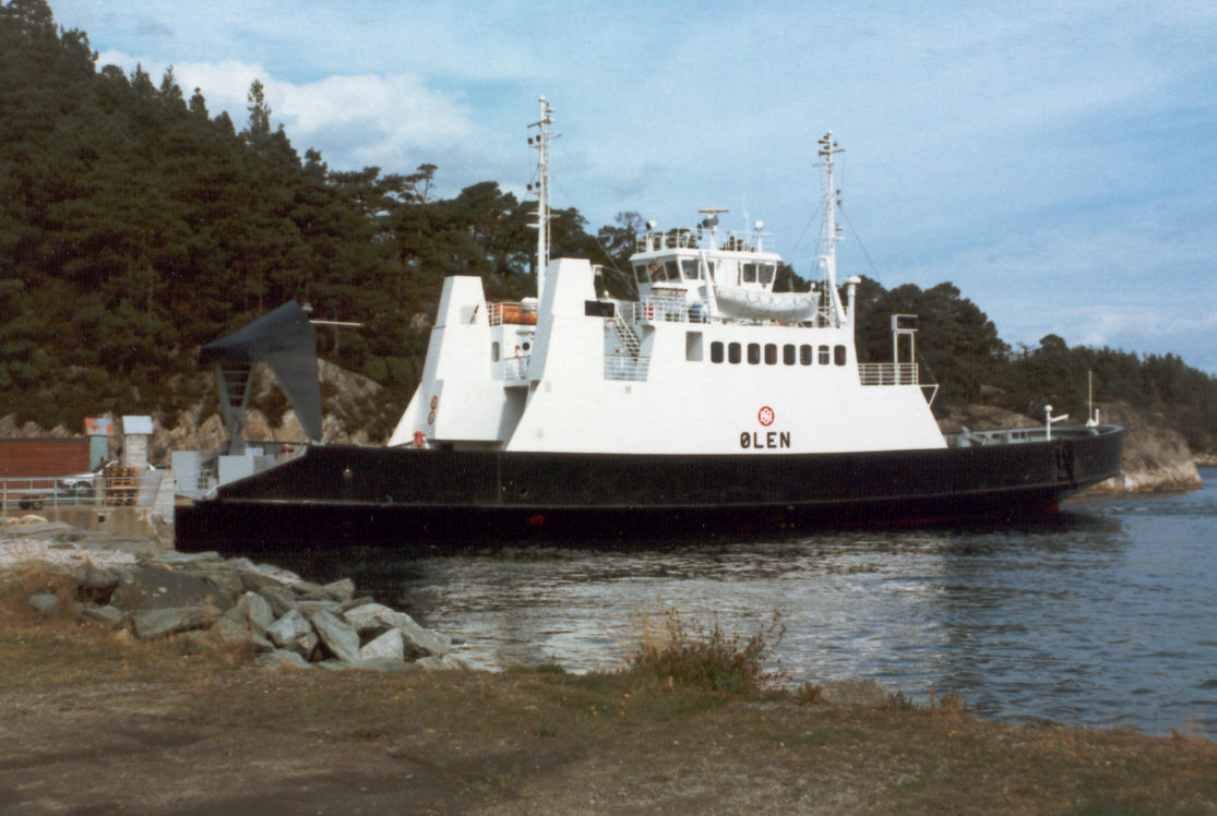 MF Ølen, built in 1977.